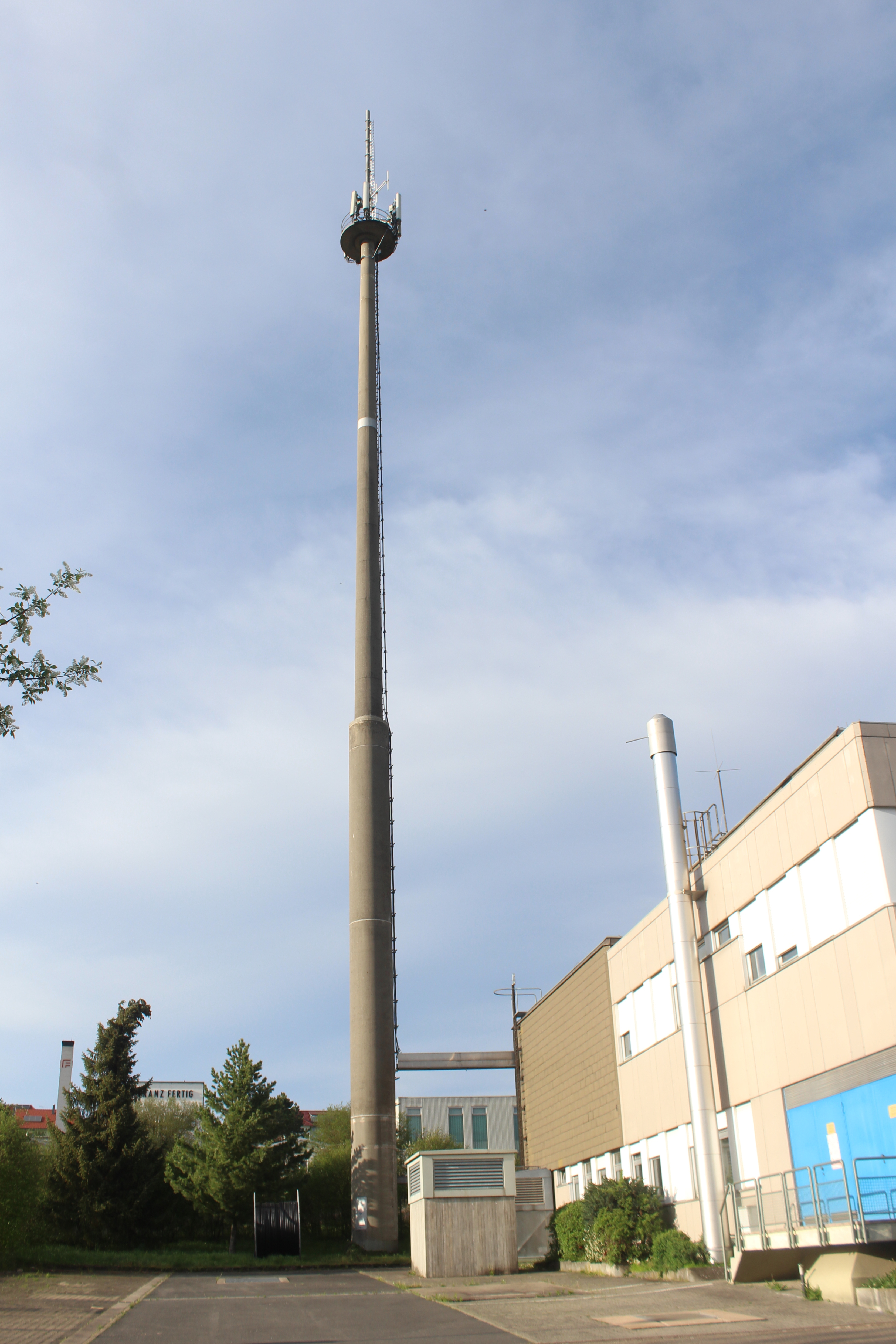 Funkturm Buchen